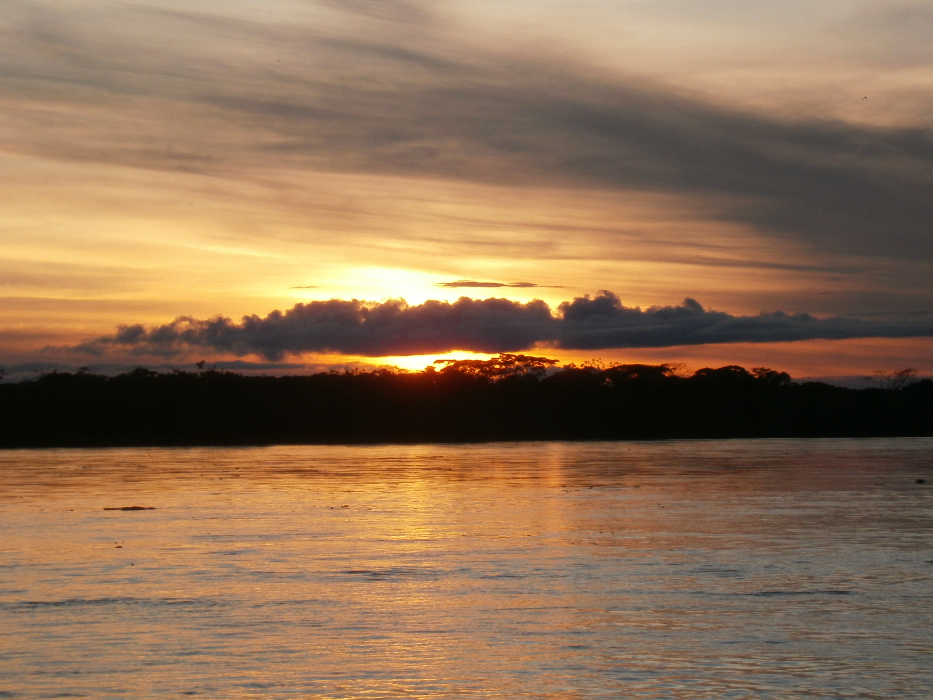 Puesta de sol sobre el río